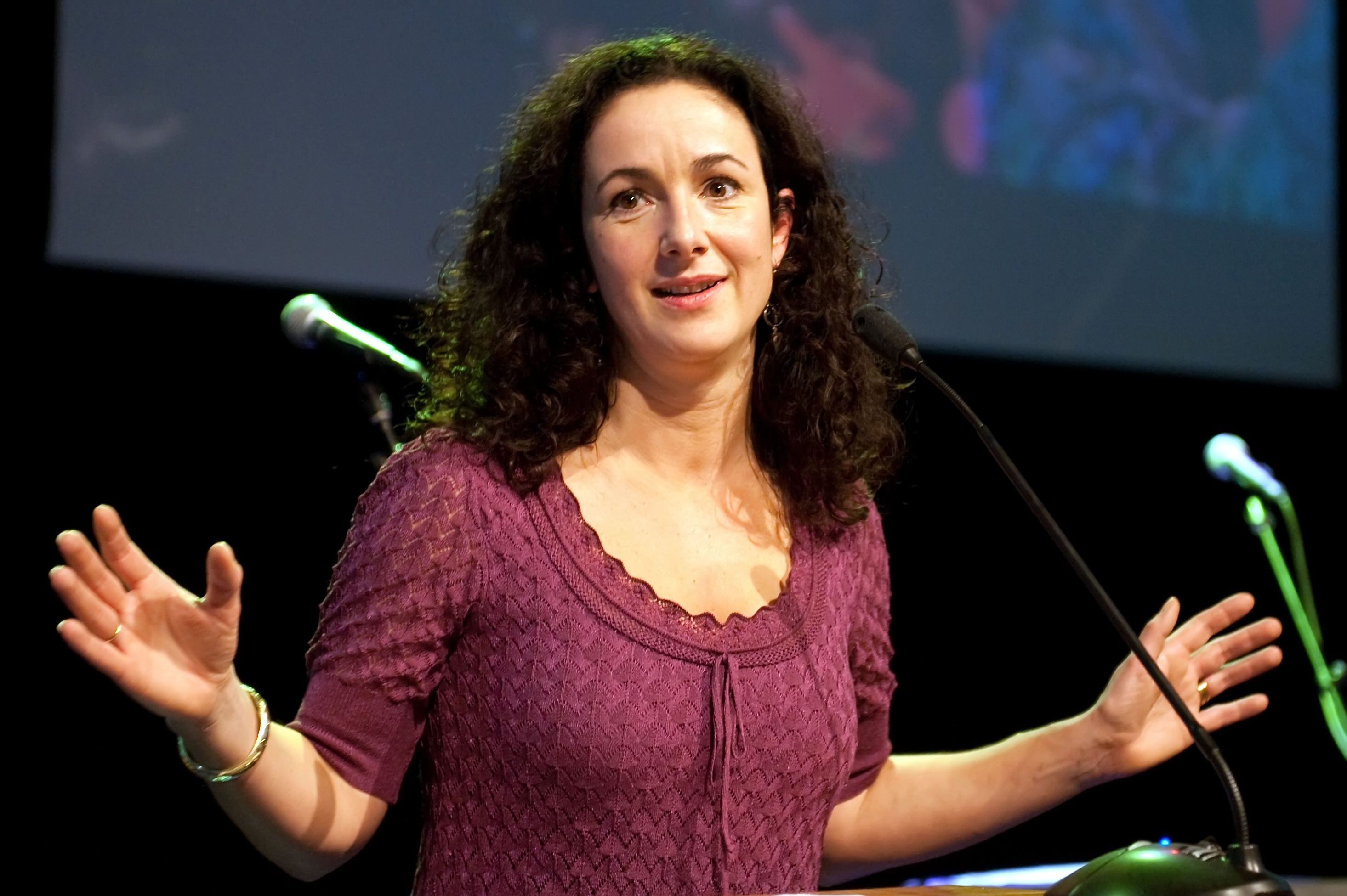 Het feest in Amsterdam was vooral niet politiek beladen. Halsema hield geen campagnepraatje voor GroenLinks, maar prees vooral de vrijheid van meningsuiting in het algemeen. De bijeenkomst bestond verder uit veel dans en optredens van onder andere Ellen ten Damme en Sara Kroos. Femke's #twist.